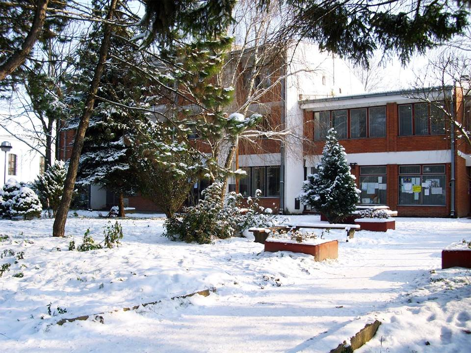 Нови Козјак зими